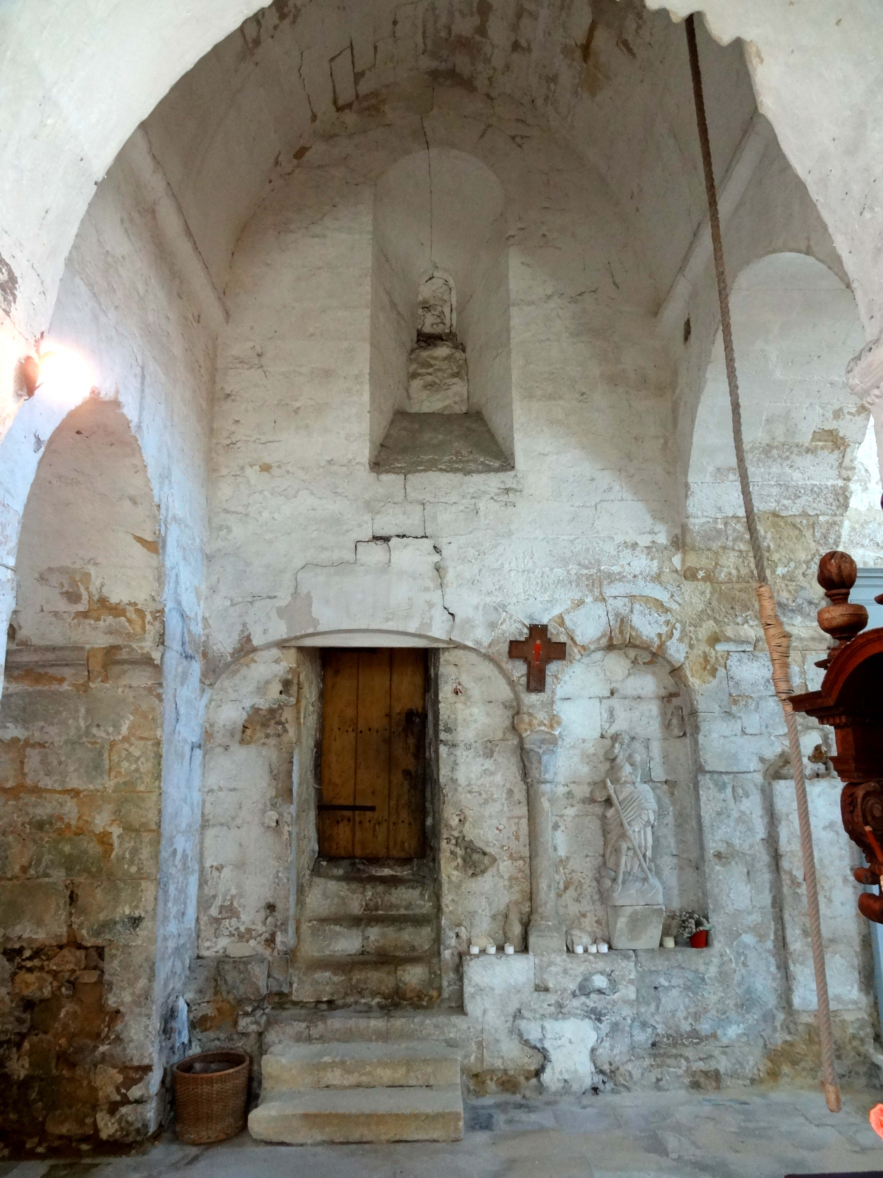 Intérieur de l'église - voir titre.